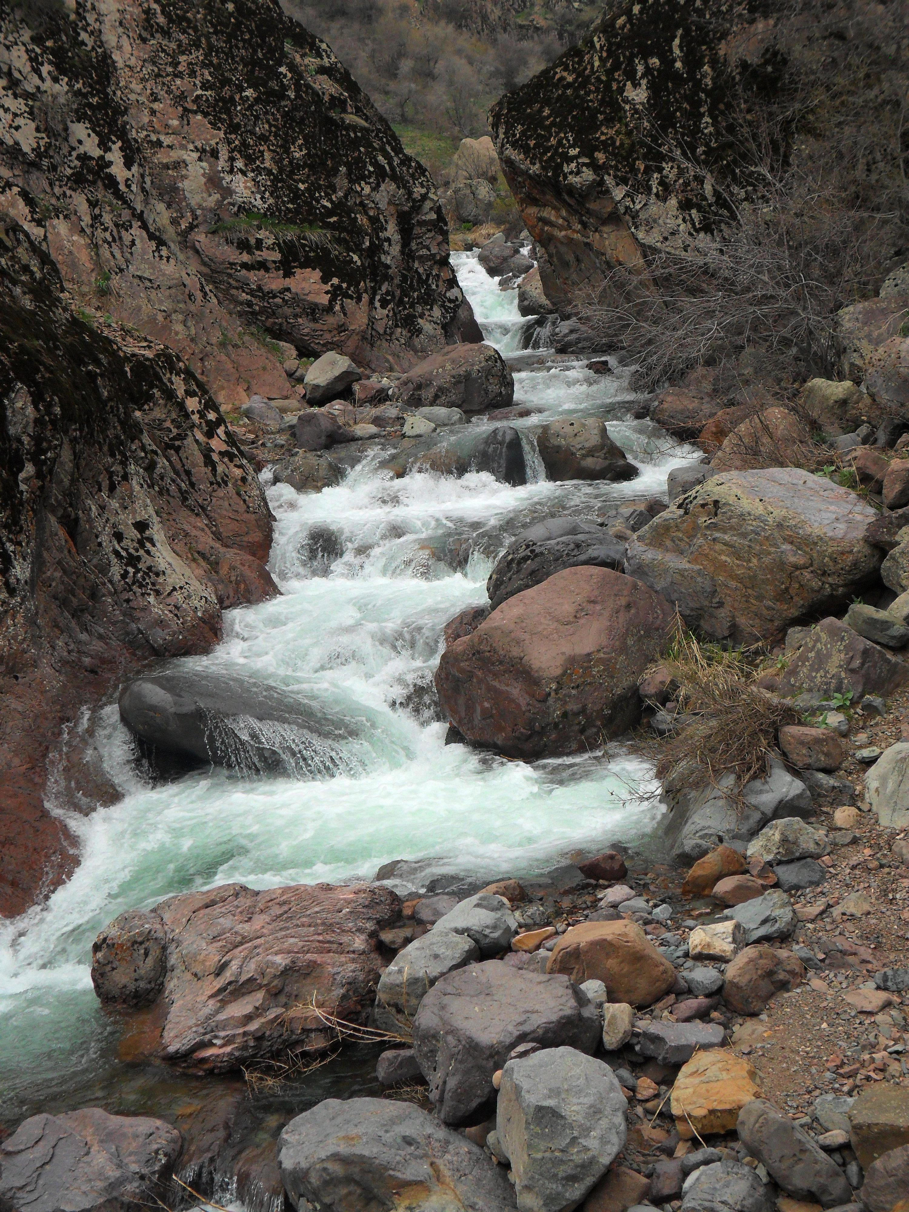 Верховья Кызылсу. Бостанлыкский район, Ташкентская область, Республика Узбекистан